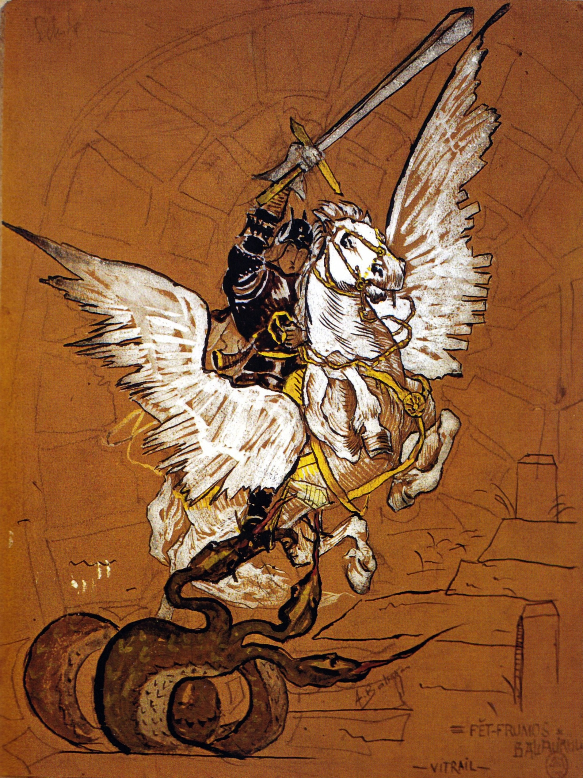 Făt Frumos în luptă cu smeul